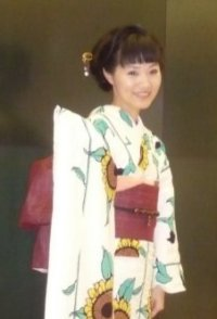 2010年7月31日。イオン 北戸田ショッピングセンターにて。